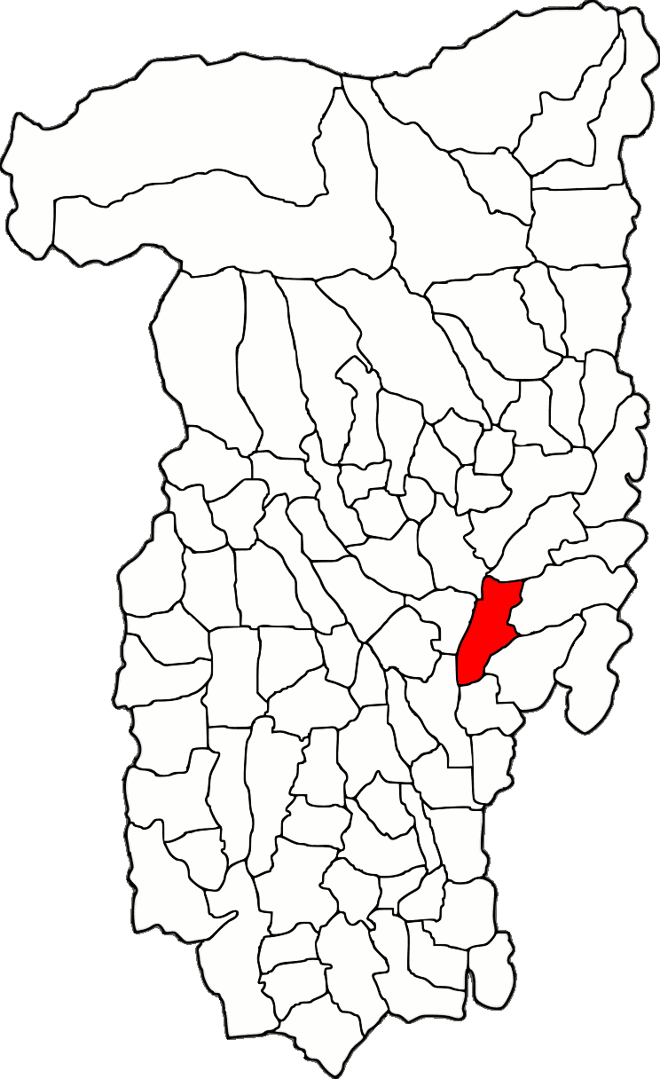 Lage der Gemeinde Galicea im Kreis Vâlcea (RO).